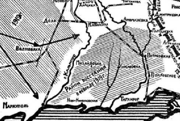 Таганрозьке повстання також Лютневе повстання в Таганрозькій окрузі — повстання селян Таганрозького округу проти частин Добровольчої армії в лютому 1919 року.